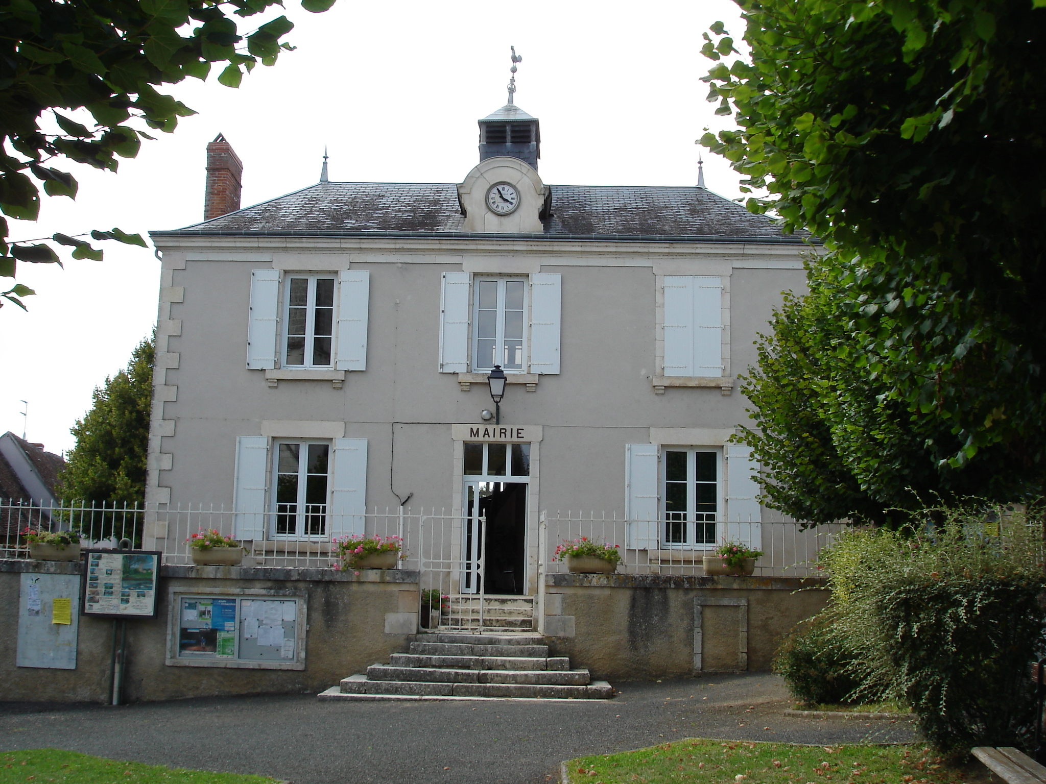 Concremiers (36) : La mairie.